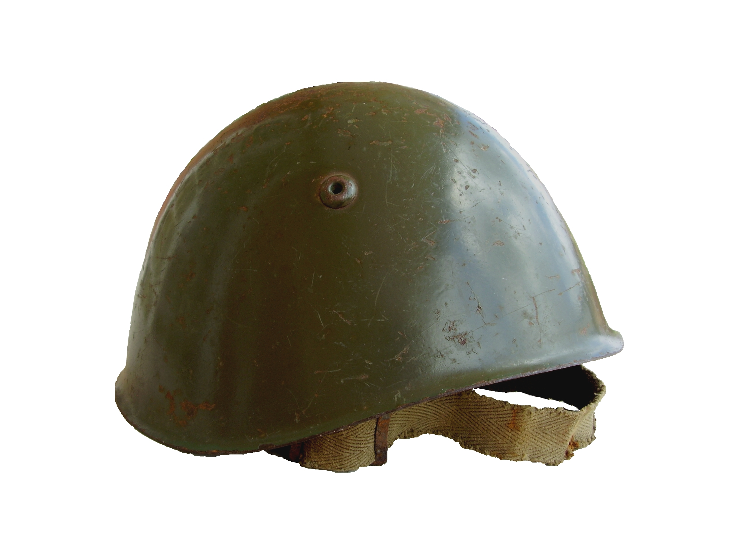 Elmetto M33 anno 1956 esercito italiano